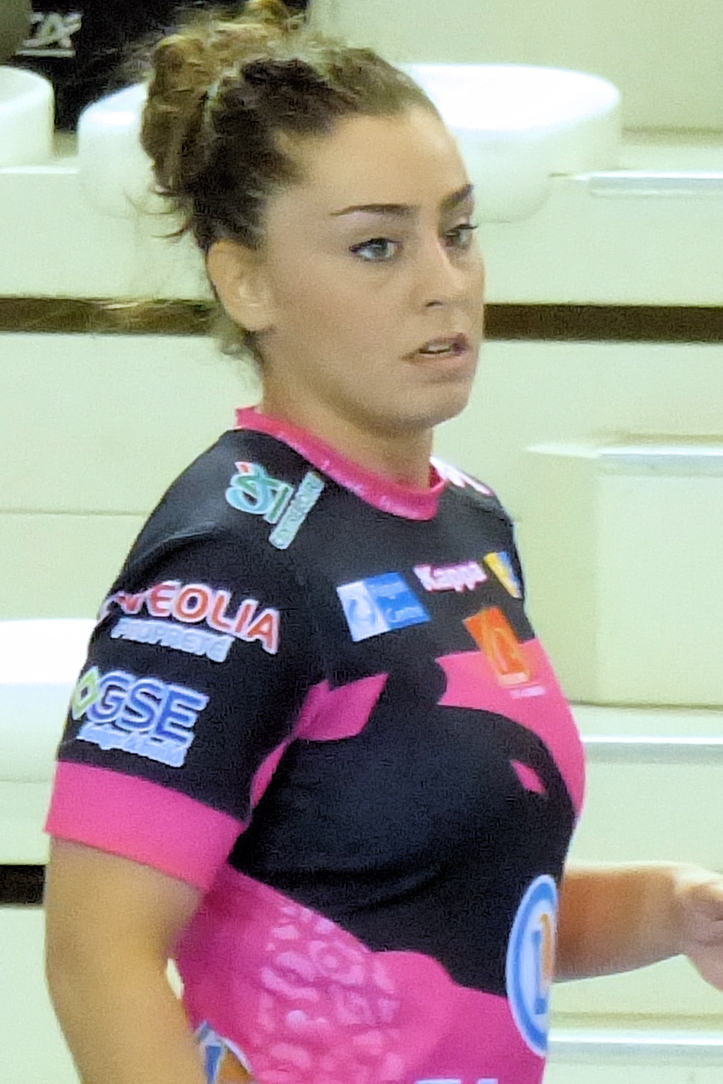 Marta López Herrero ailière droite du Fleury Handball. 14 mai 2014